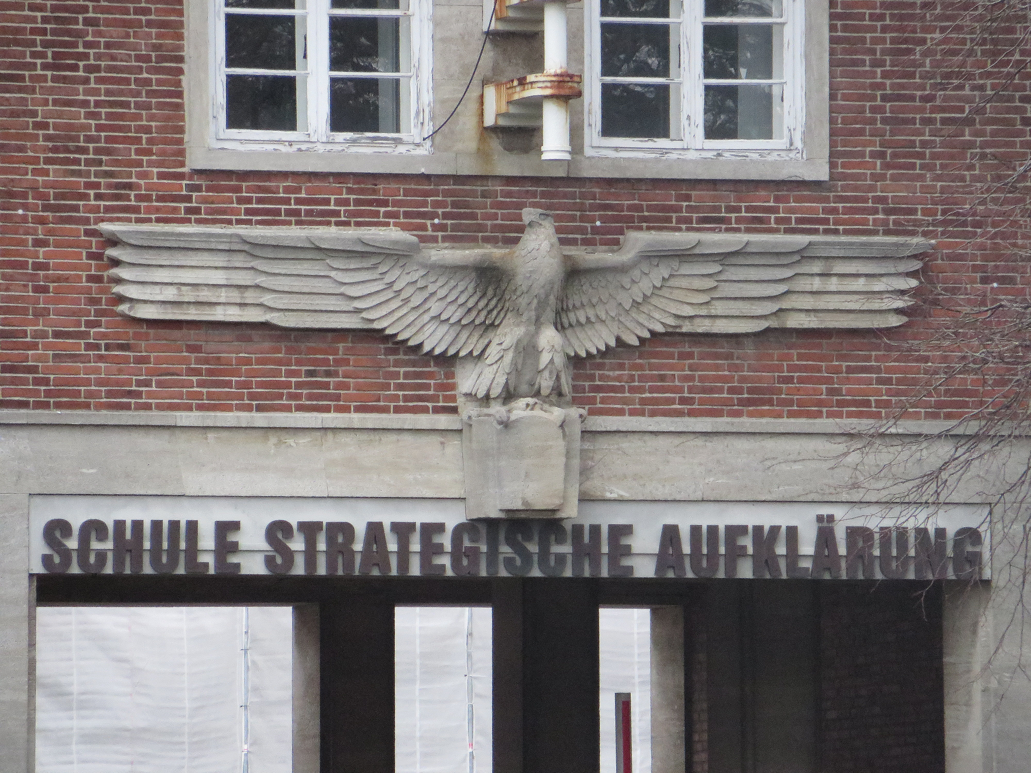 Nachrichtenschule Flensburg-Mürwik, Adler, Schriftzug SchStrat, März 2016, Bild 05B; sharper version